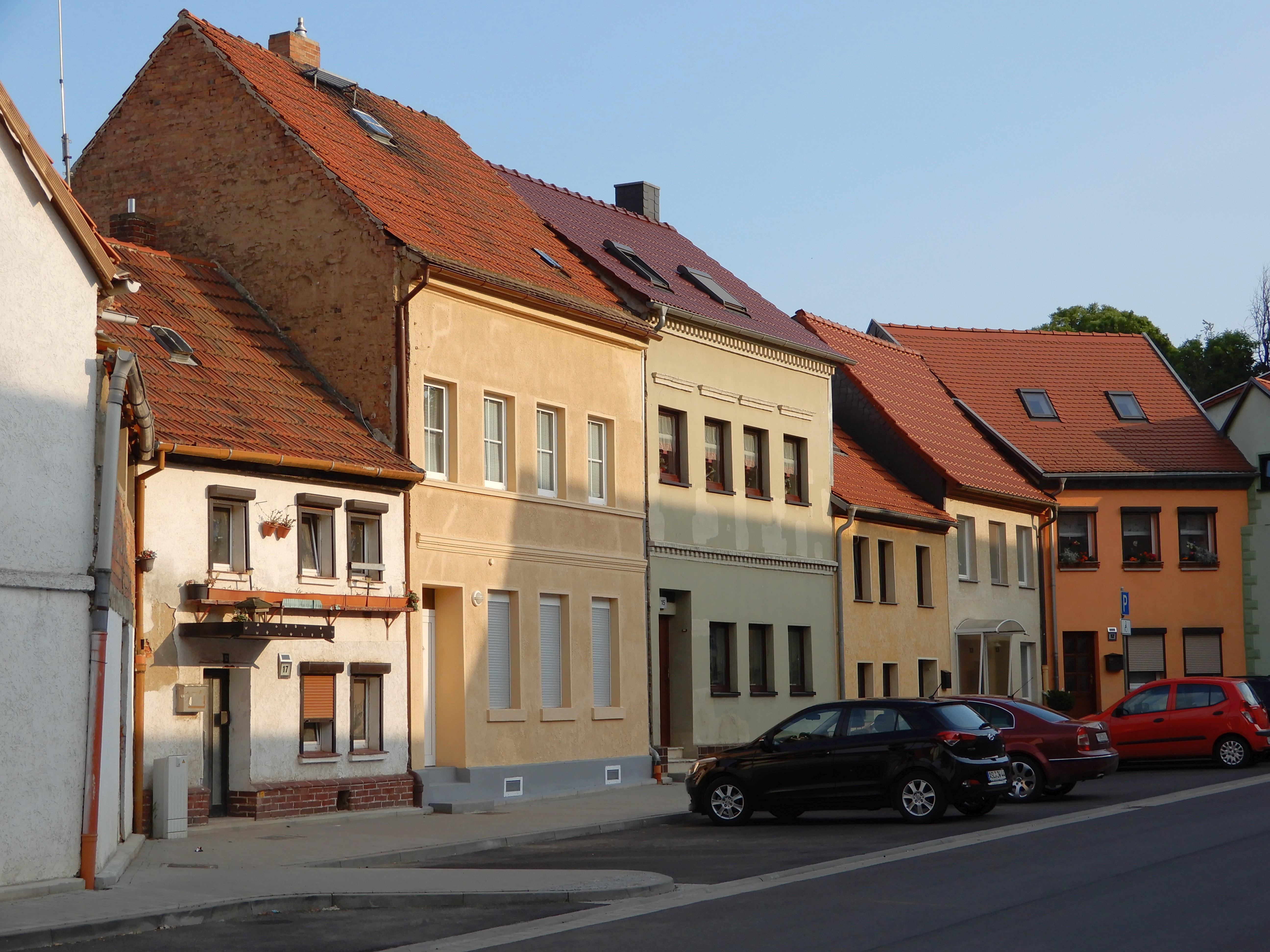 Gebäude Wasserplan 13-17 in Aschersleben